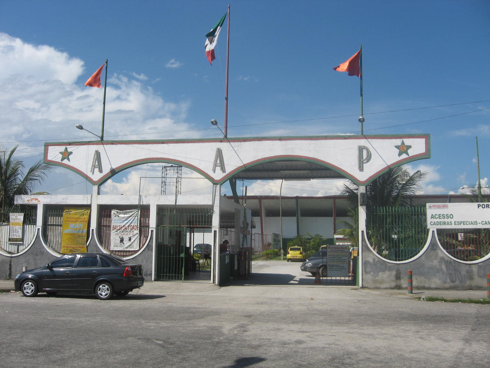 Entrada do estádio Luso-Brasileiro, sede da AA Portuguesa, do Rio de Janeiro.